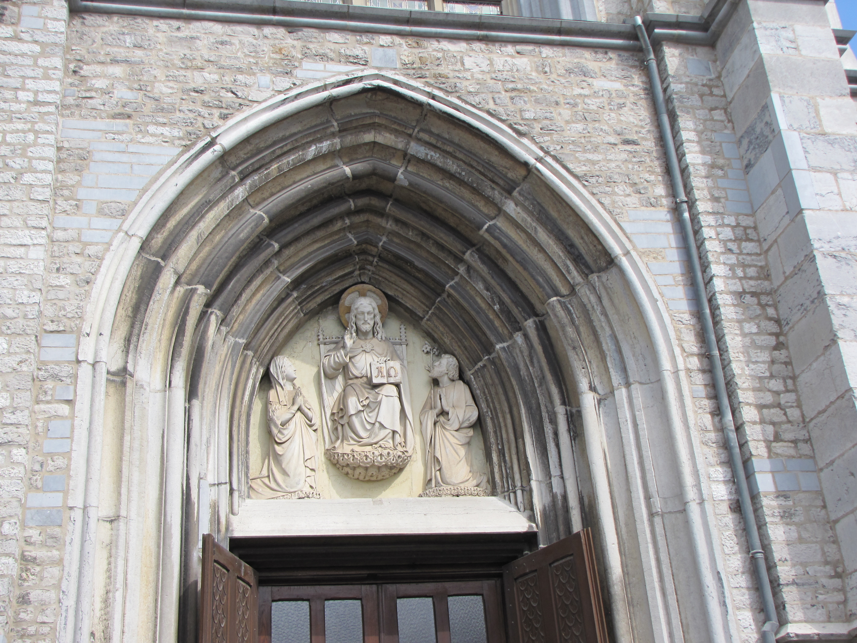 Eglise St Joseph, néogothique, Eupen